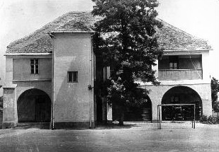 a volt Makói Belvárosi Iskola